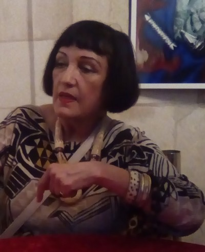 Christine Spengler en dédicace à la Maison Européenne de la Photographie